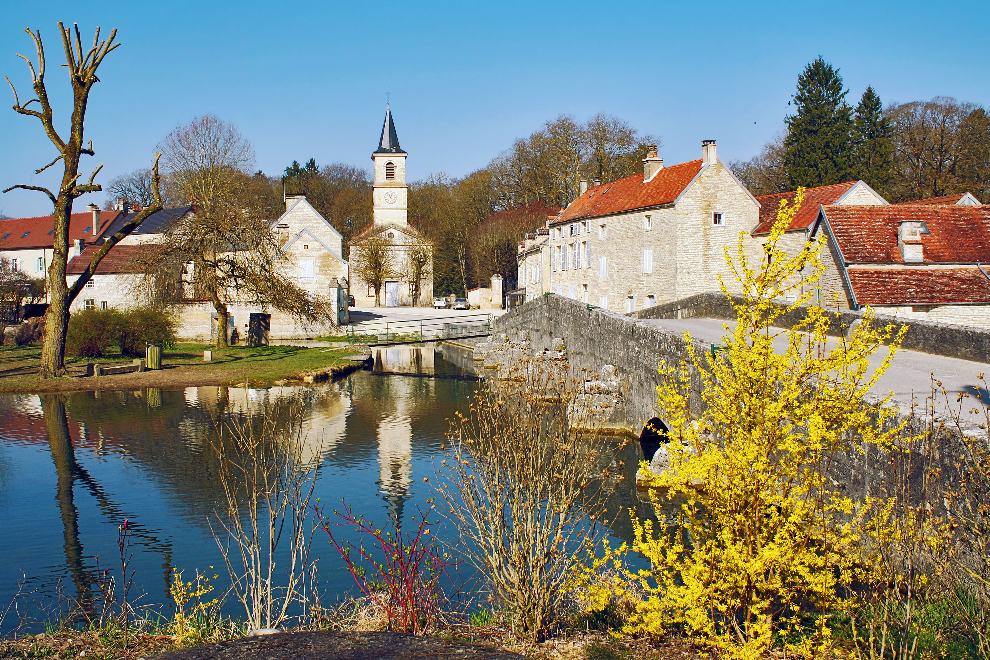 La Seine à Chamesson